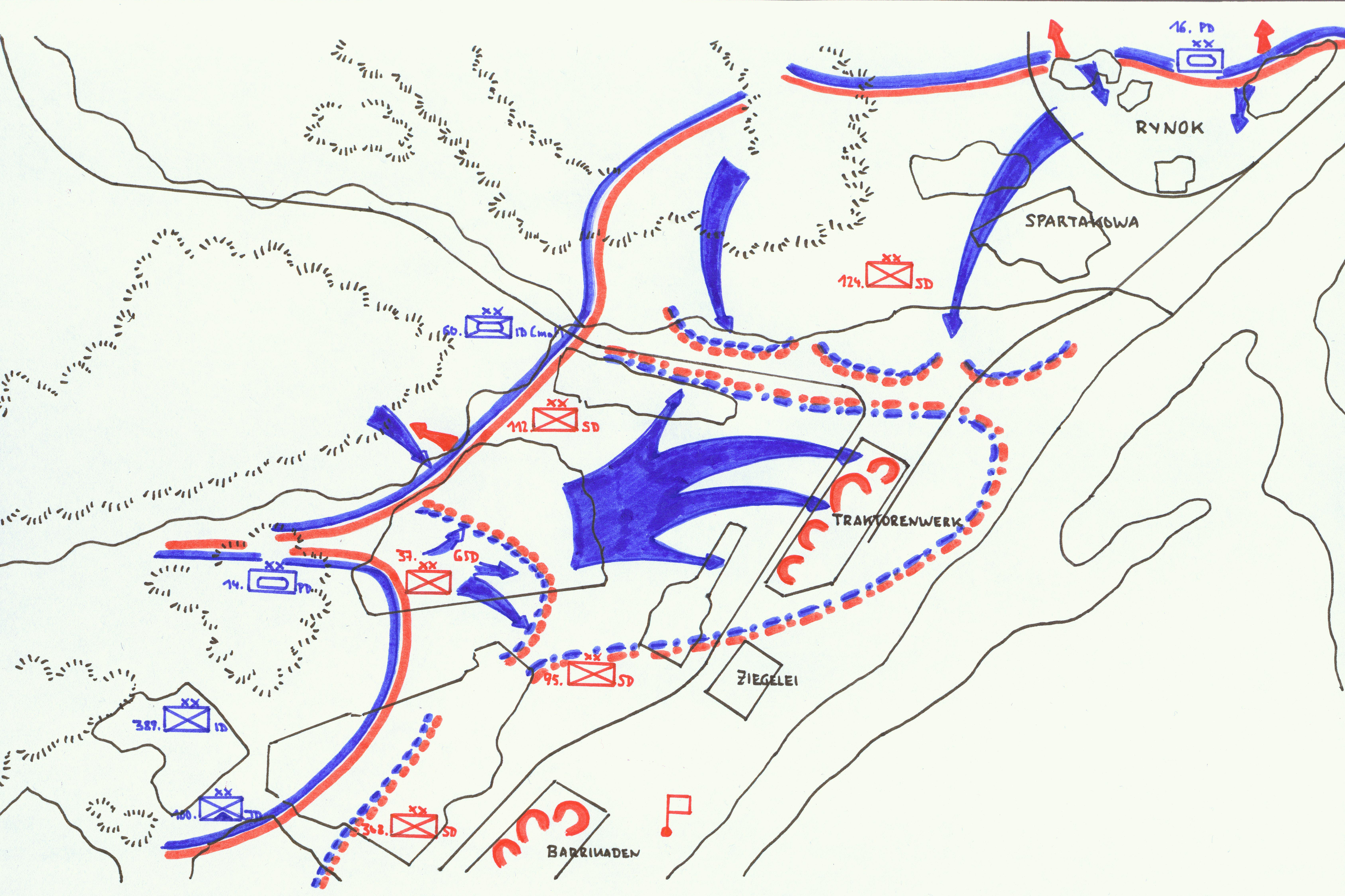 Kämpfe im Raum Traktorenwerk 5-15.10.1942